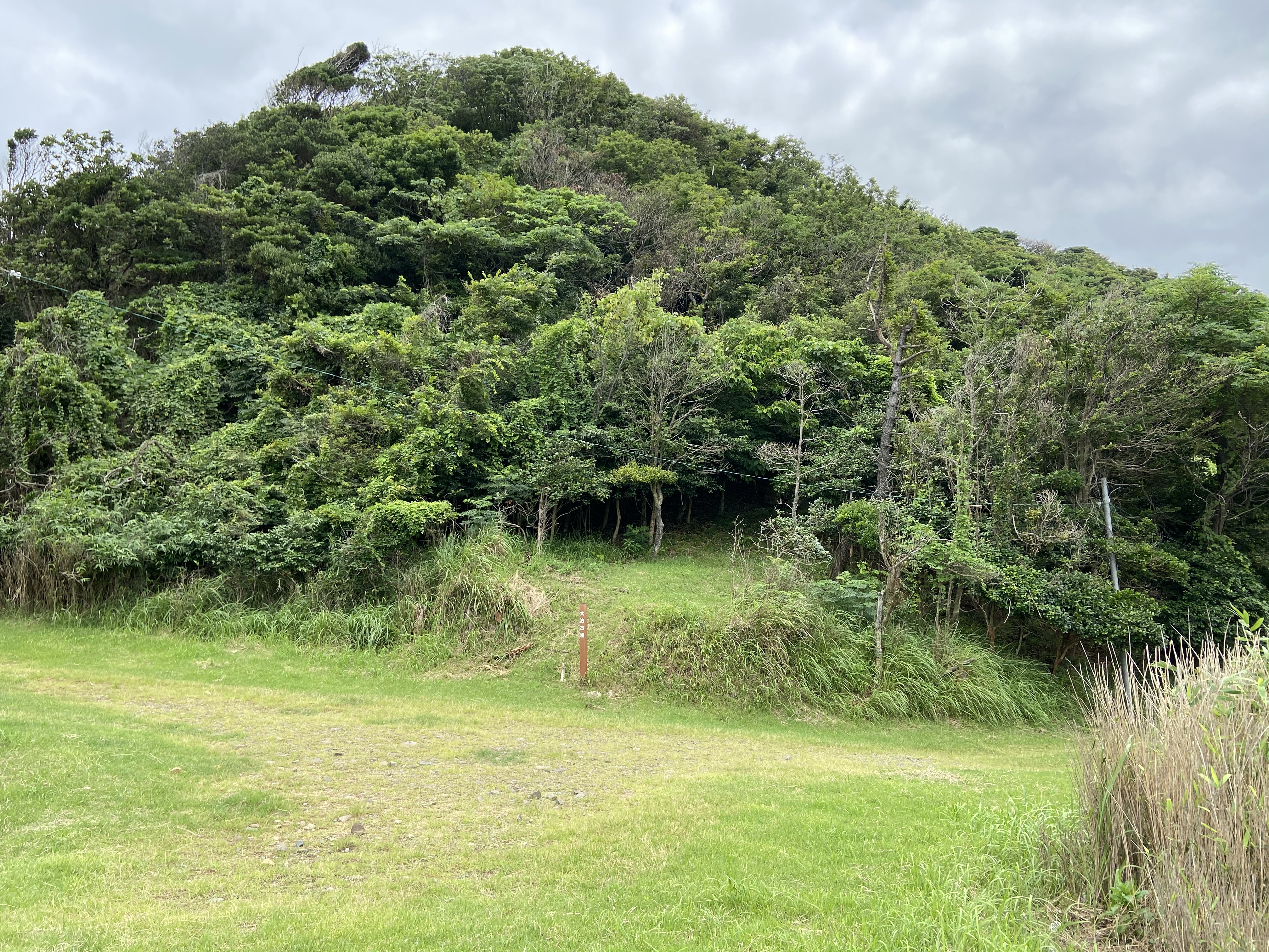 大泊古墳群（京丹後市）の1号墳